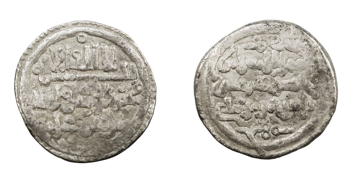 Quirate de plata del Imperio Almorávide acuñado bajo Yusuf ibn Tašufin. Sin fecha ni ceca.